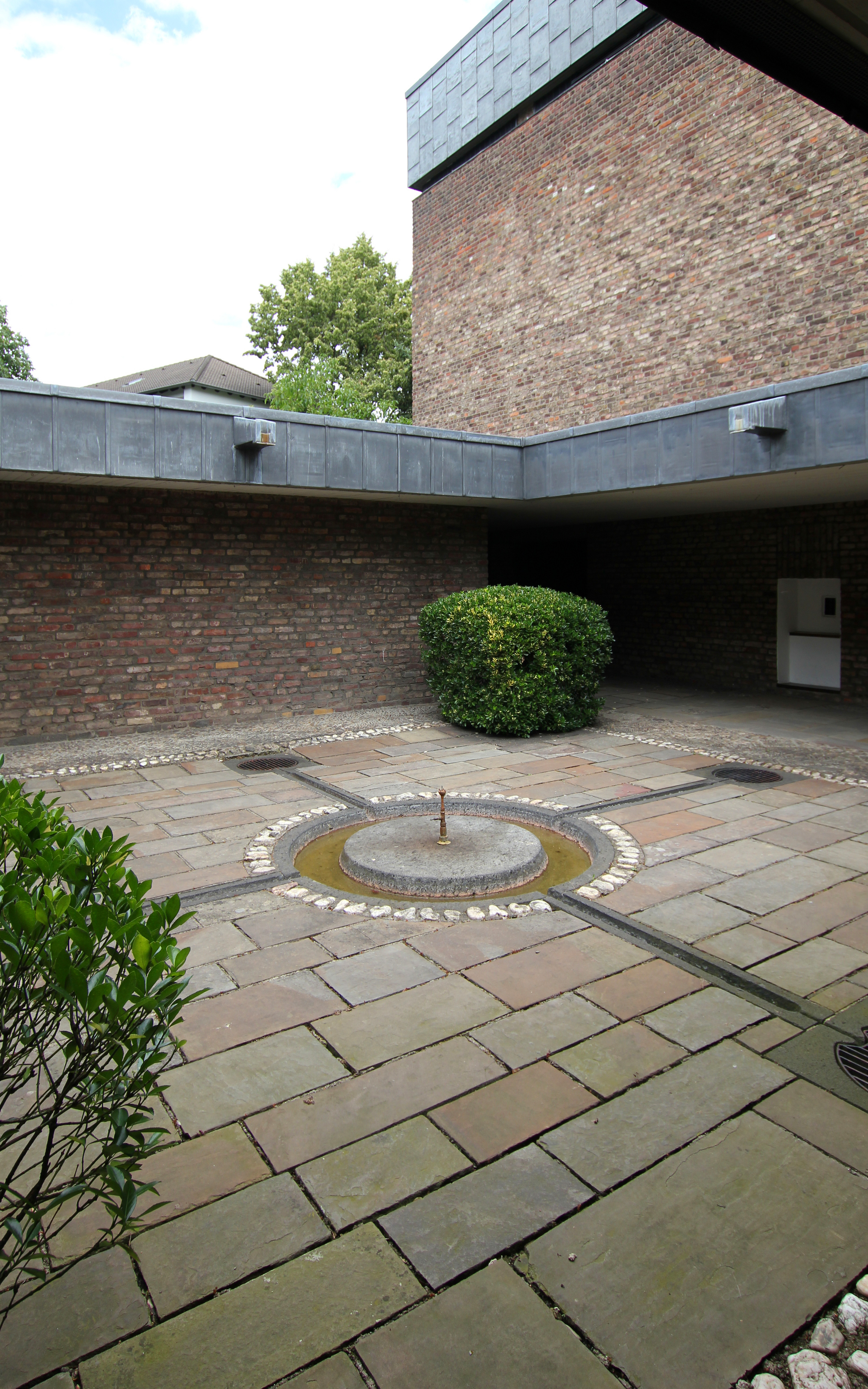 Köln-Lindenthal, An St. Laurentius 1. Brunnenanlage im Innenhof der katholischen Kirche St. Laurentius. Die Gesamtanlage St. Laurentius wurde in die Liste der Denkmäler im Kölner Stadtteil Lindenthal aufgenommen. Architekten: Emil Steffann und Gisbert Hülsmann, erbaut 1961